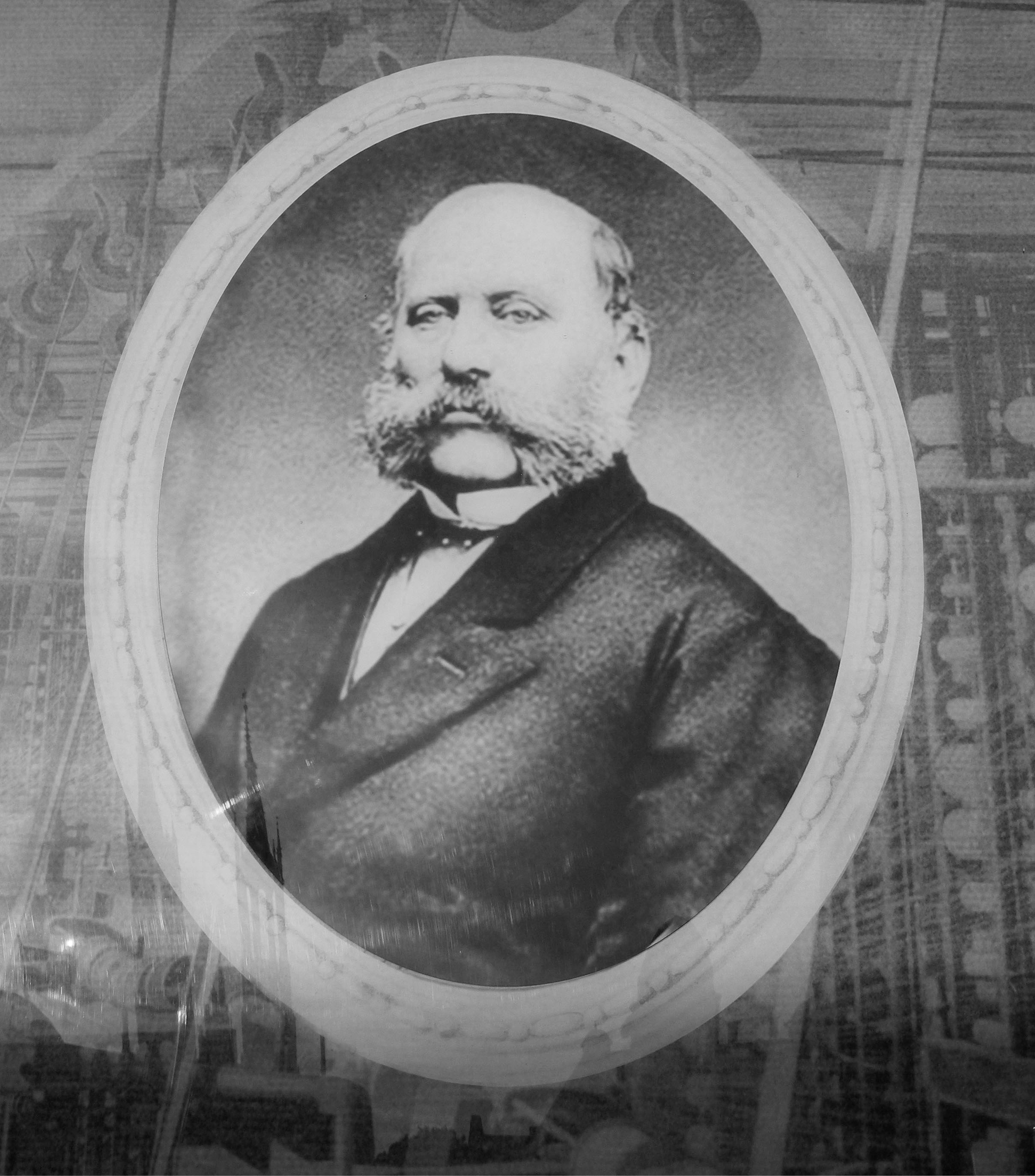 Karl August Dittrich (1819–1886), Besitzer der Textilfirmen Hielle & Dittrich in Schönlinde und Żyrardów